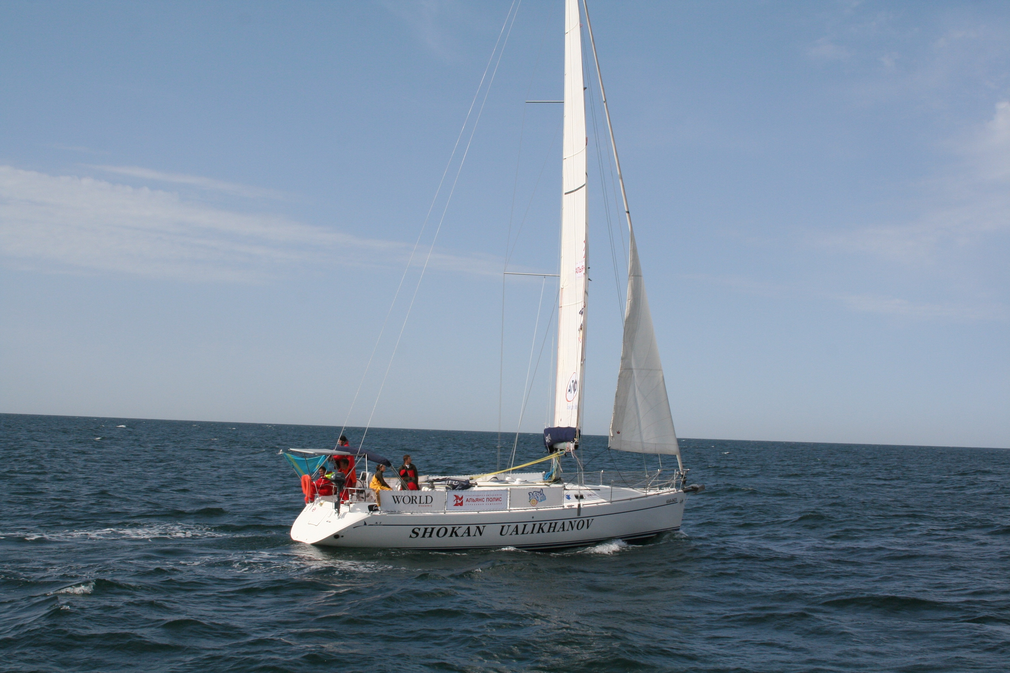 Яхта Чокан Валиханов во время старта кругосветной экспедиции. Каспийское море 25 сентября 2007 года.